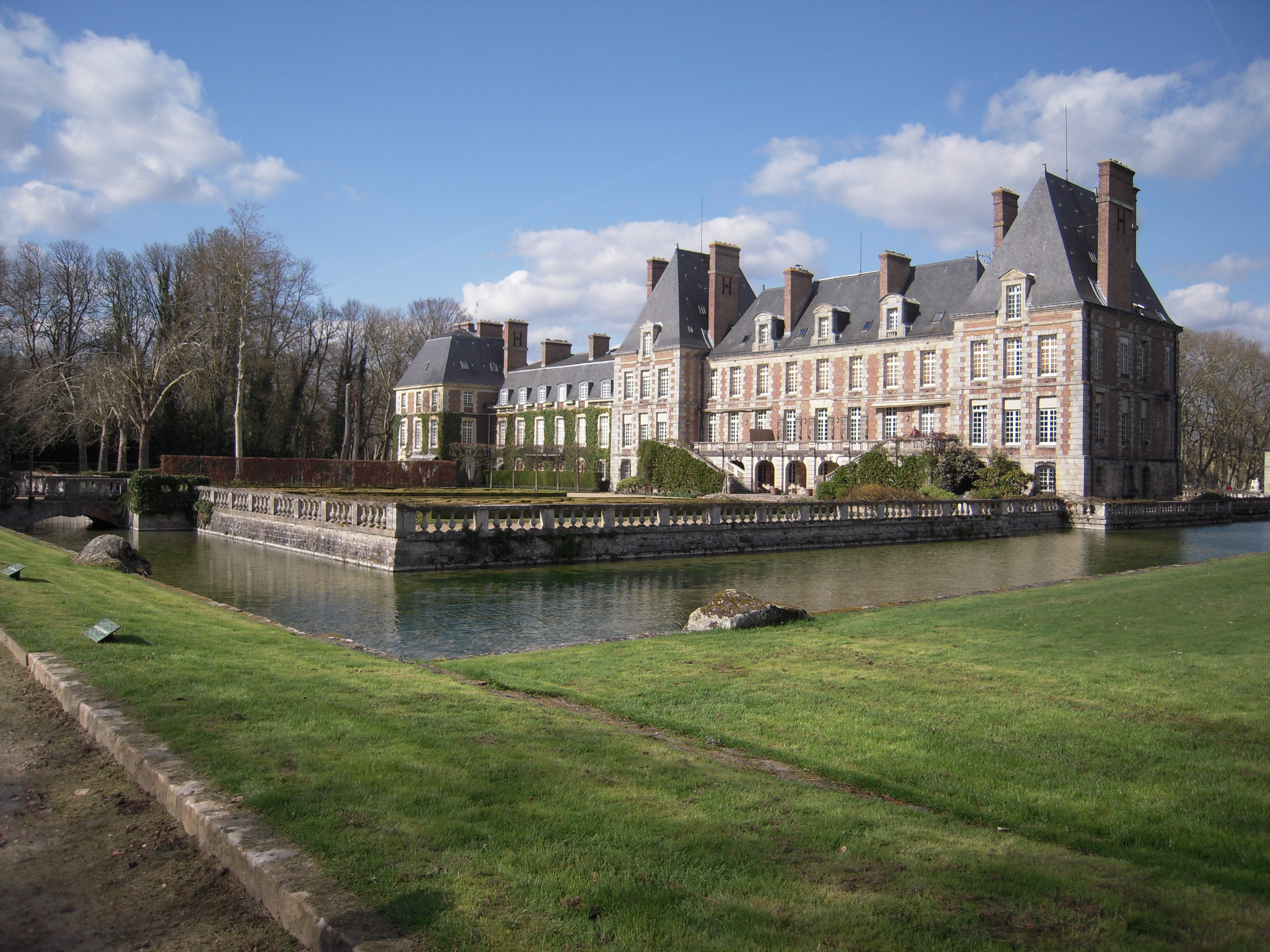 Château de Courances (Classé) - vue côté jardin avec douves .